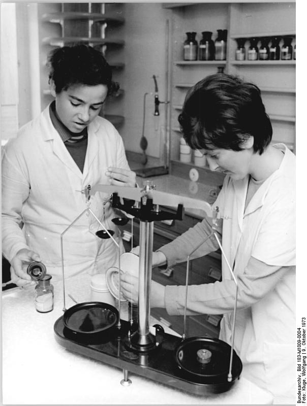 Hohburg, Apotheker Medizin herstellend ADN-ZB Kluge 9.10.73 Bez. Leipzig: Neues Gesundheitszentrum- Die Assistentin Heidrun Schöne und der Apothekenfacharbeiter Gerd Quaas sind in der Apotheke des neuen Gesundheitszentrums in Hohburg (Bez.Leipzig) tätig, das zum 24. Jahrestag der Republik an die Gemeinde übergeben wurde. Zu dieser Einrichtung gehören eine Arzt- und Zahnarztpraxis sowie eine Gemeindeschwesterstation, die die Einwohner Hohburgs im Rahmen des "Mach-mit"-Wettbewerbes schufen. Die drei Betriebe der Gemeinde leisteten dabei finanzielle und materielle Hilfe.